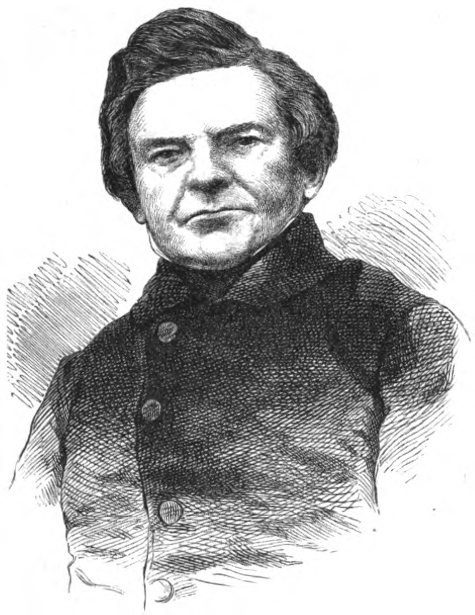 Ludwig Gall, deutscher Erfinder und Sozialtheoretiker im 19. Jh.